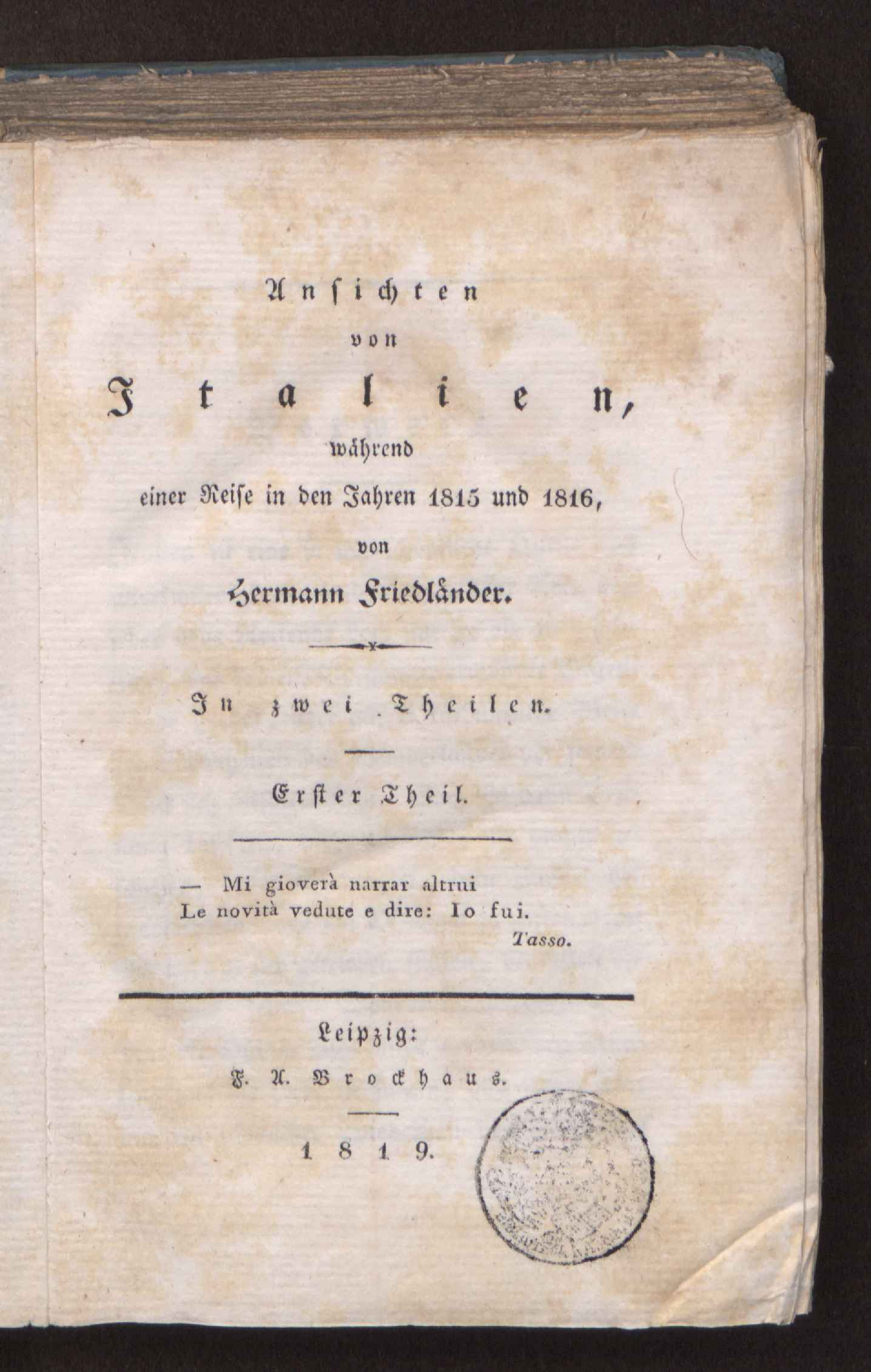 Frontespizio